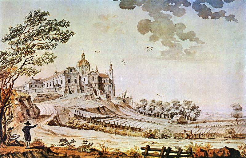 Widok Poczajowa od przyjazdu Ledóchowskiego. Akwarela. 29,8 x 46,7 cm.